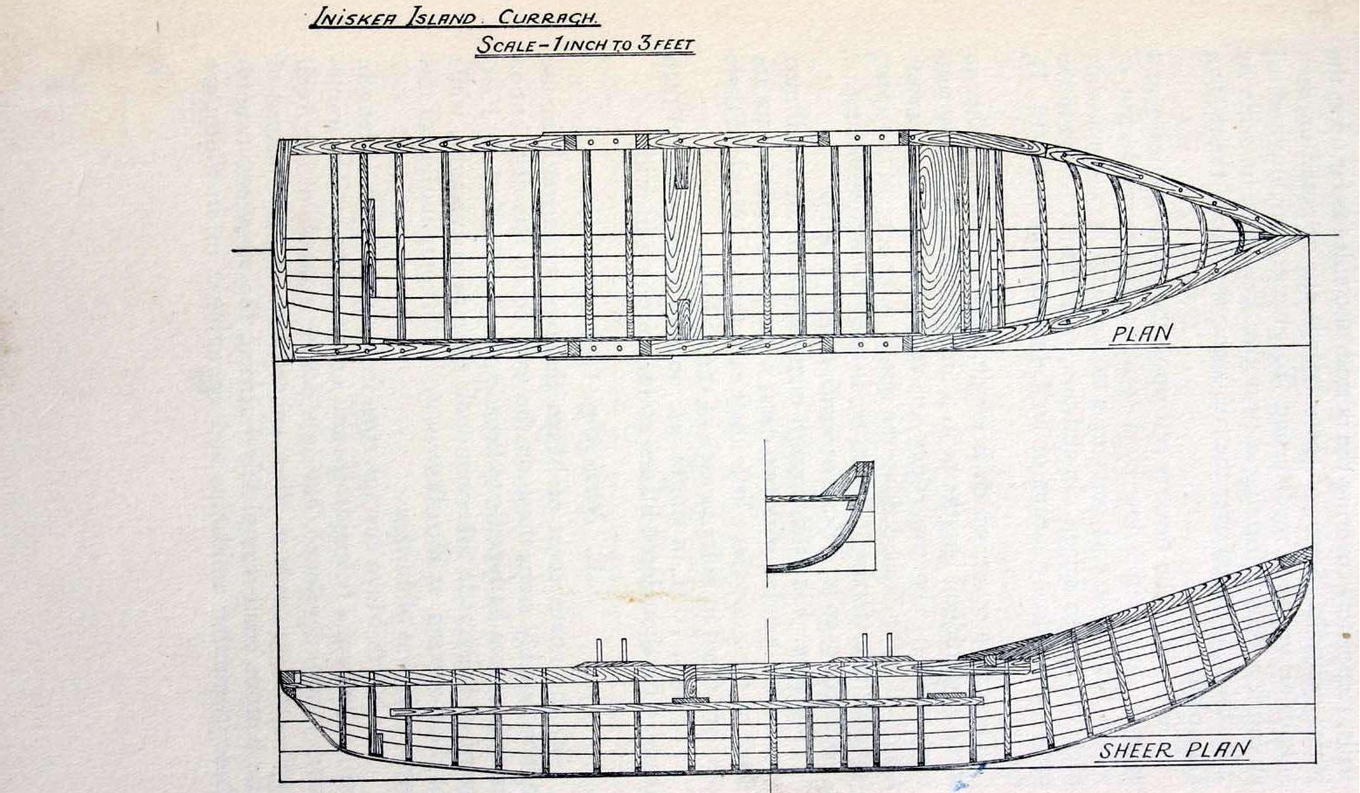 Теоретический чертёж курраха острова Инишке